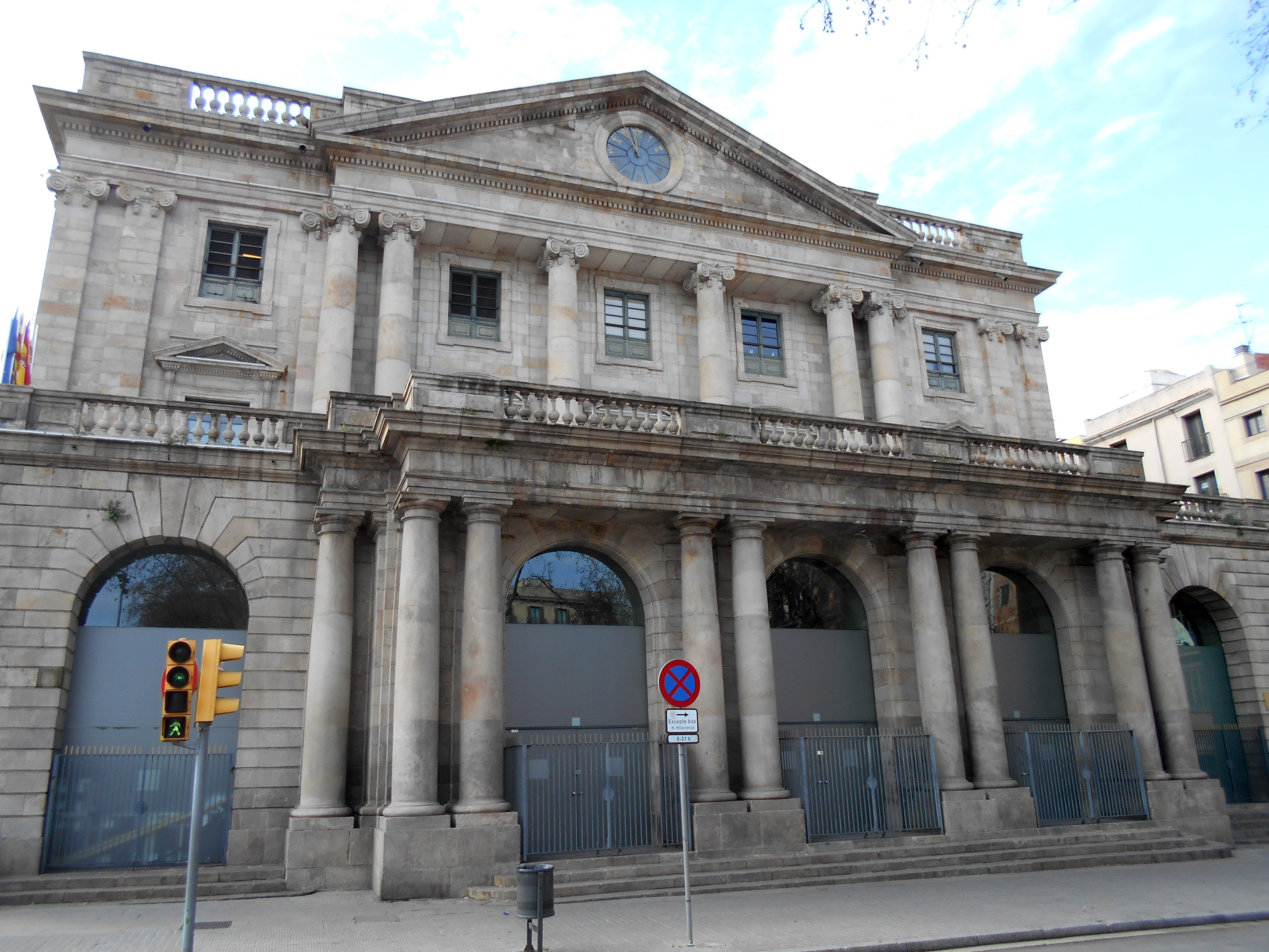 Lonja de Mar.